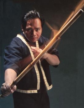 PG Sulite